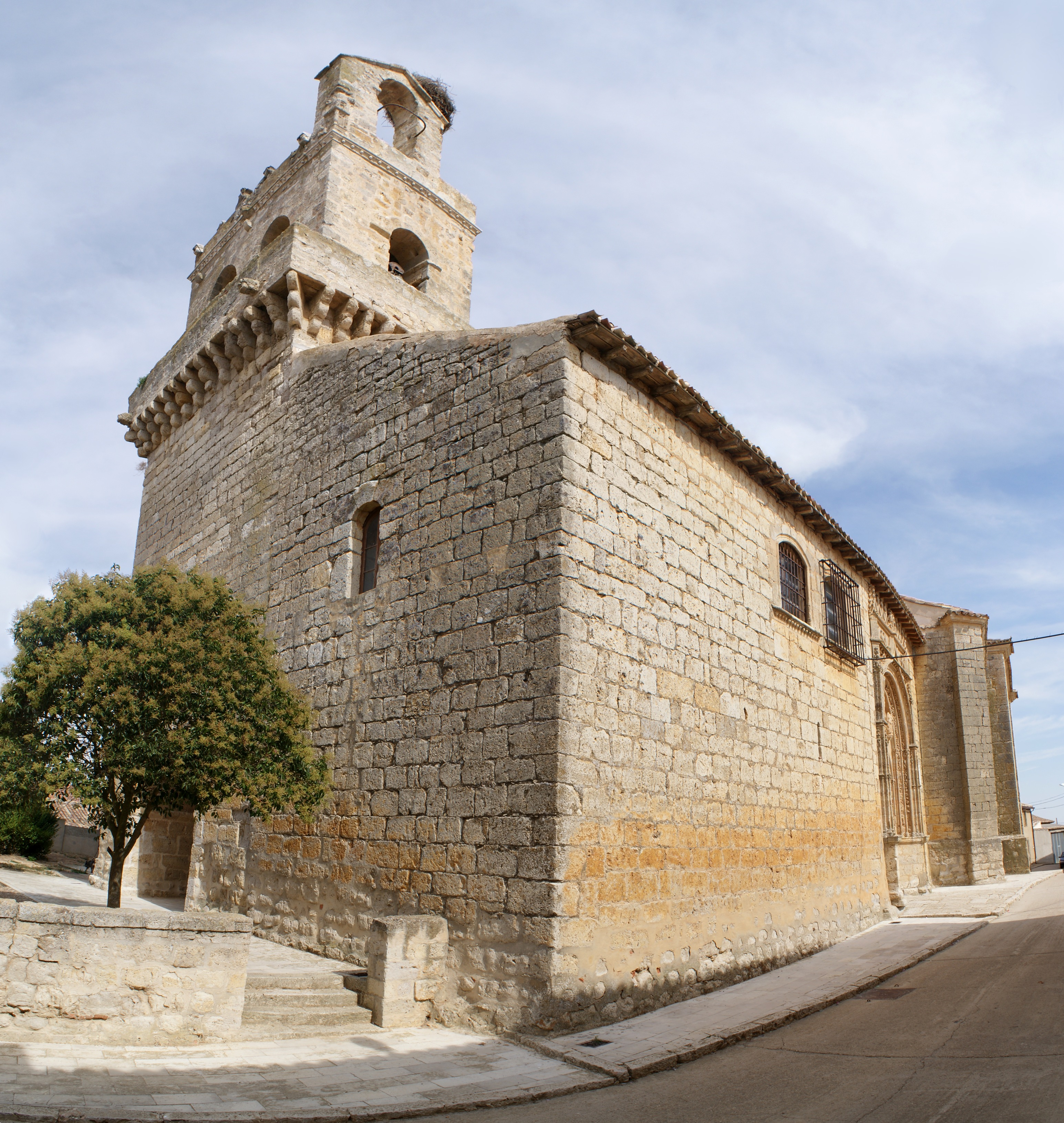 Iglesia de Nuestra Señora del Tovar en Meneses de Campos, provincia de Palencia (España). Declarada Bien de Interés Cultural.